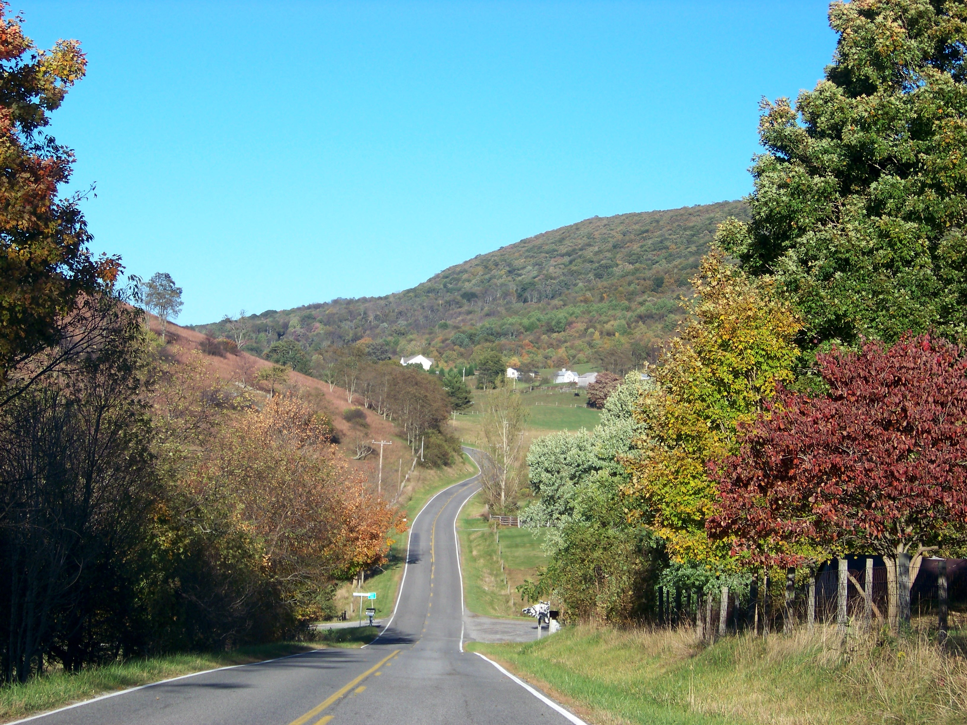 Sinking Creek, Virginia